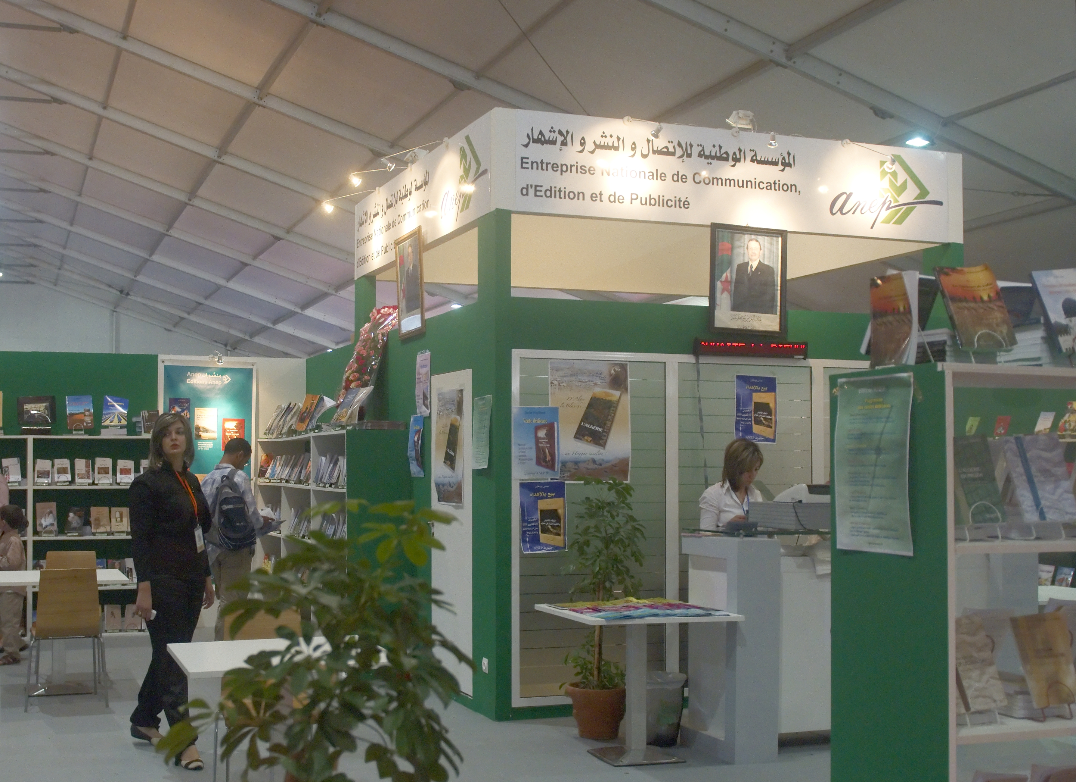 Salon du Livre Alger, un stand.